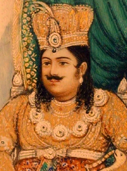 Wajid Ali Shah